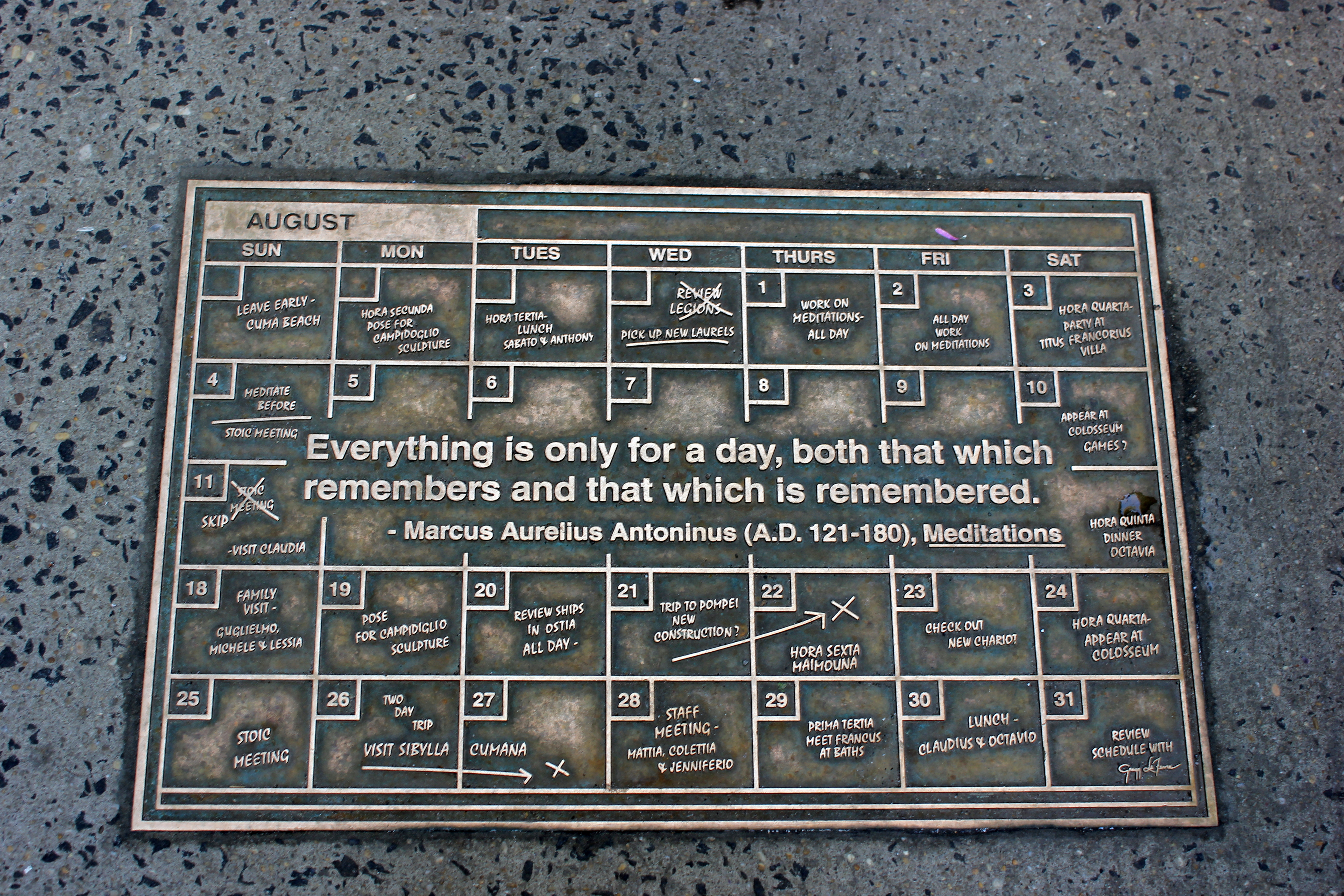 Library Walk New York City